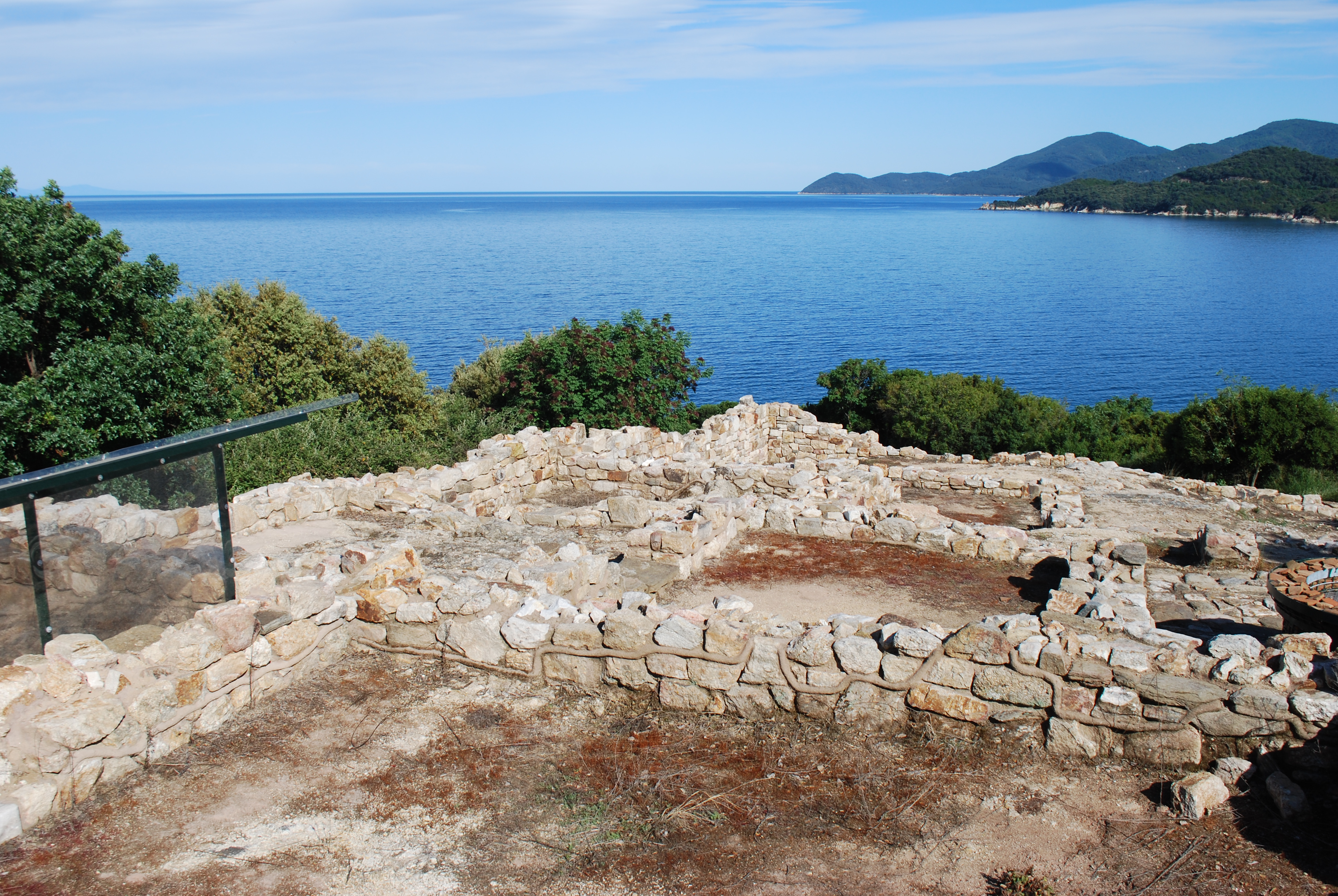 Vue du site archéologique de l'ancienne Stagire, ville natale du philosophe Aristote (Stagire, 384 av. J.-C. - Chalcis, 322 av. J.-C.).